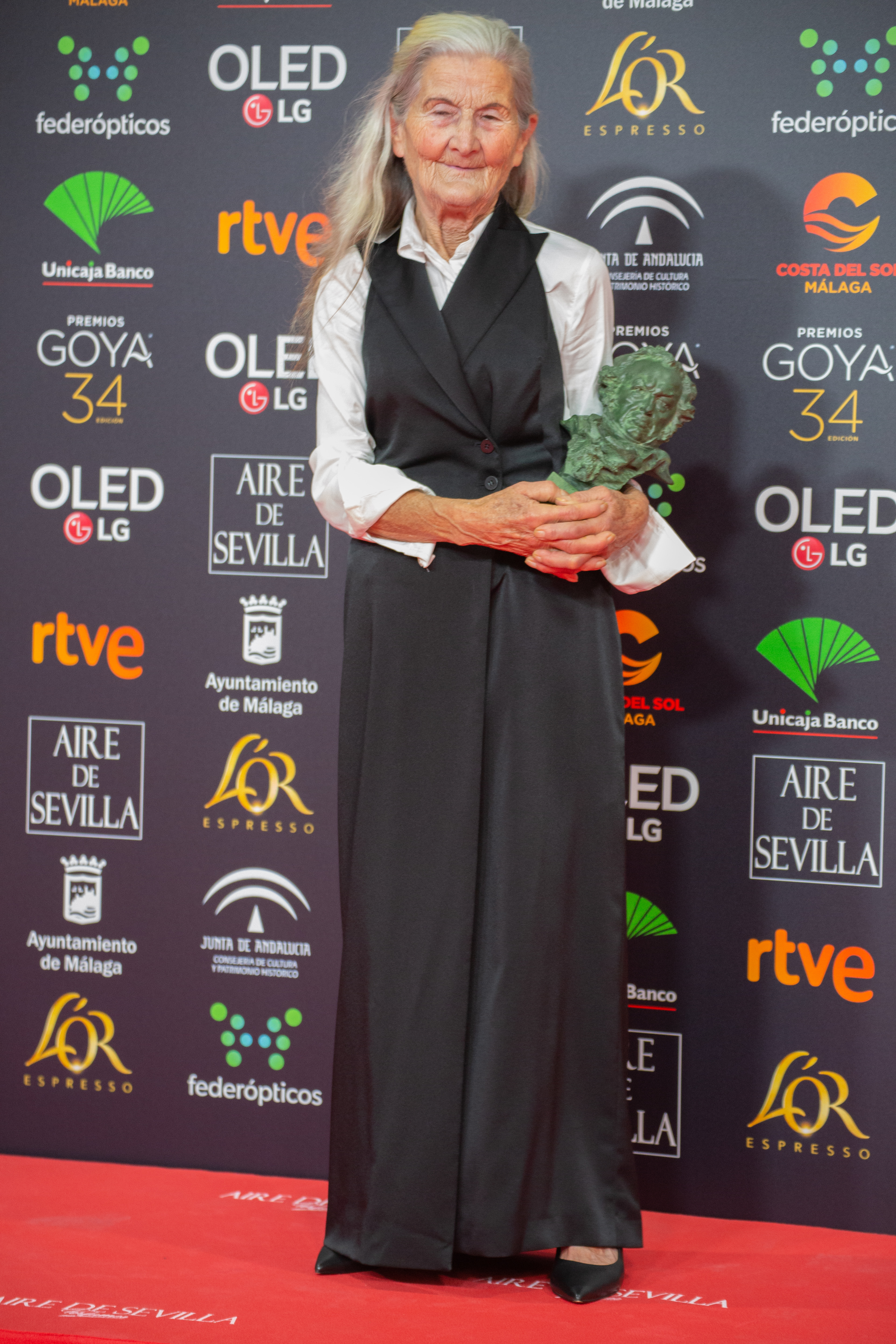 Benedicta Sánchez, ganadora del Goya a Mejor Actriz Revelación en la edición del 2020 exhibiendo su Goya en la Sala de Premiados.